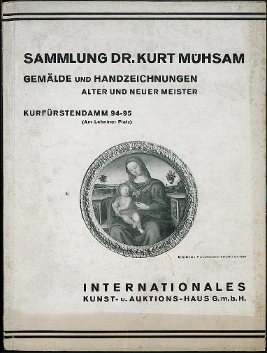 Sammlung Kurt Mühsam Versteigerung 1932 Einband. Das Bild Maria mit Kind ist von einem umbrisch-florentinischen Künstler um 1500, Katalognummer 163